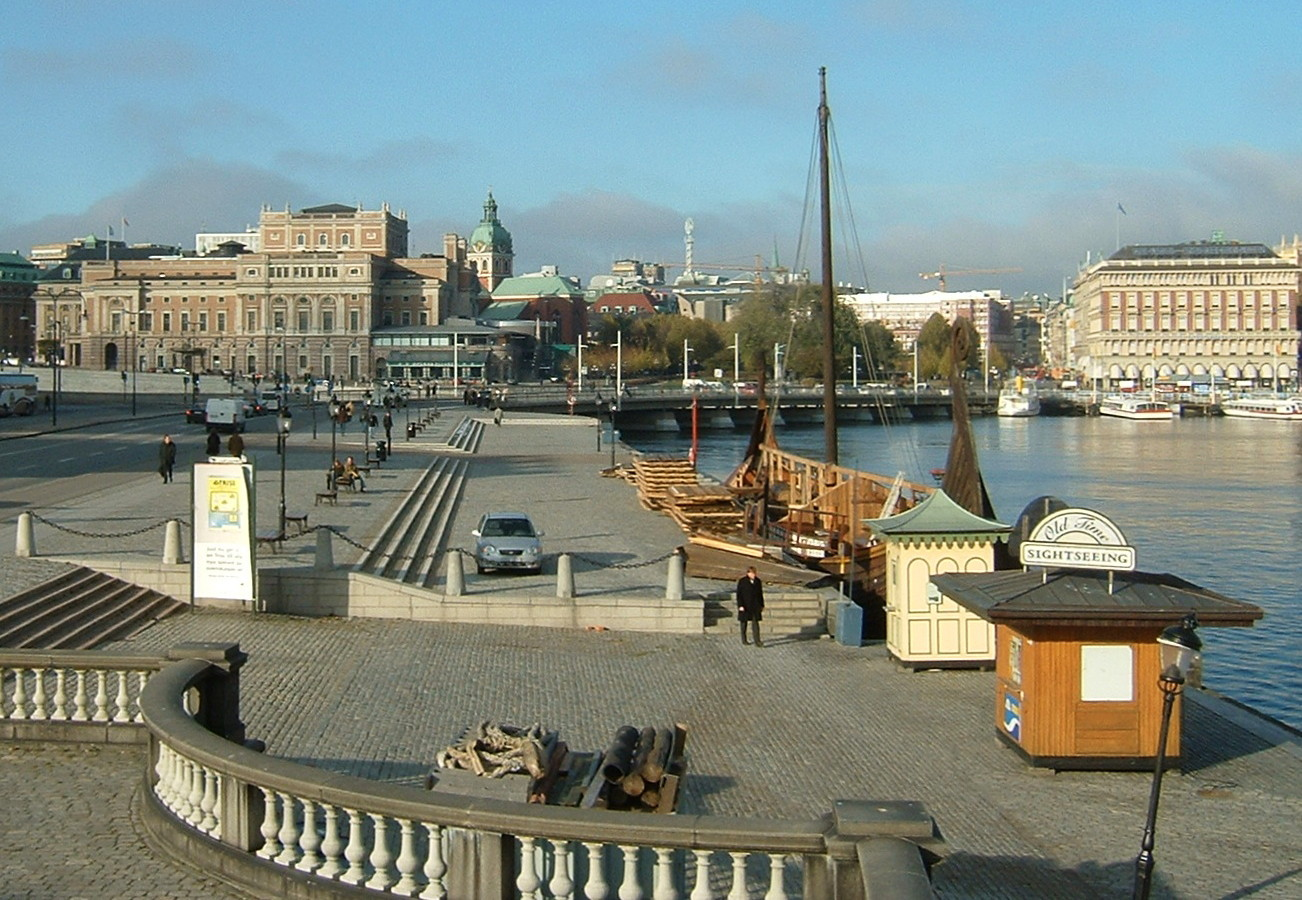 Stockholm, Zweden (okt. 2003)